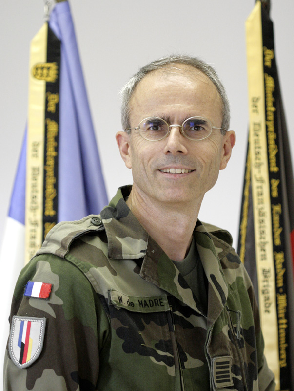 Commandant de Brigade - Adjoint Colonel WALLERAND DE MADRE.